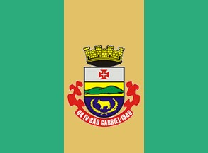 Bandeira de São Gabriel - Rio Grande do Sul